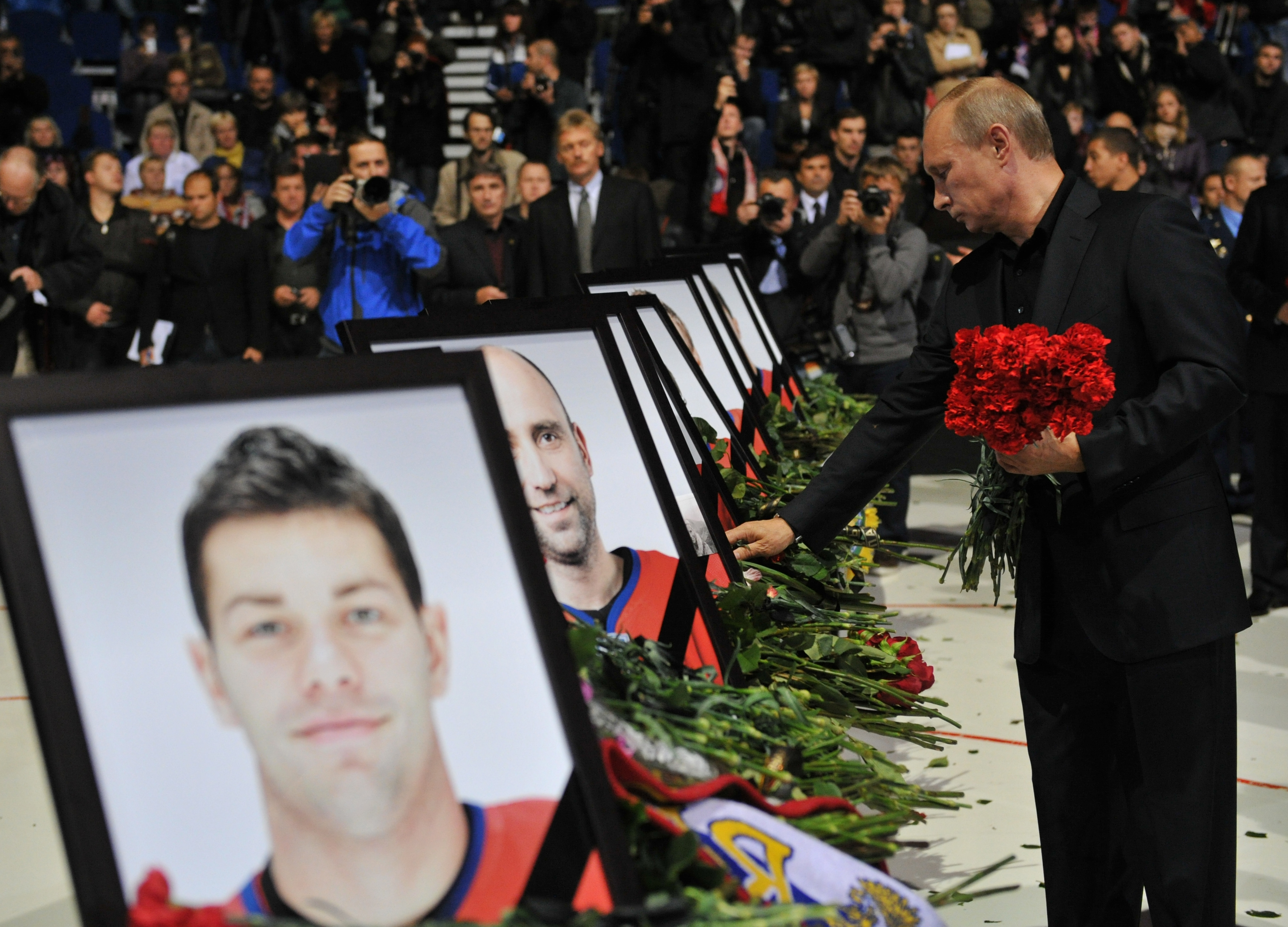 Владимир Путин на траурной церемонии прощания с хоккеистами Ярославского Локомотива